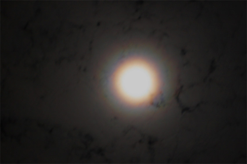 Lunar Coronae